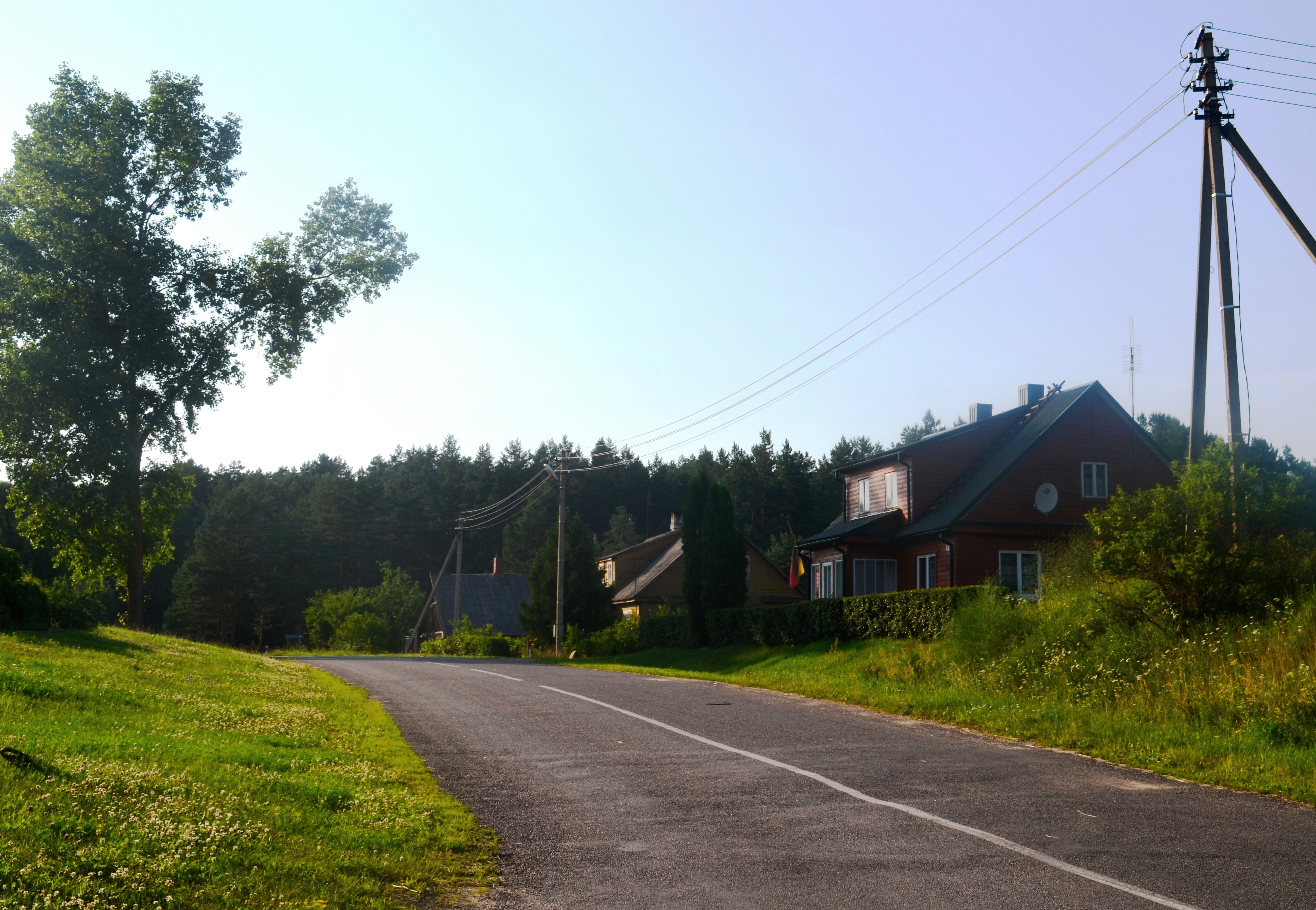 Čiobiškis, Širvintų raj.